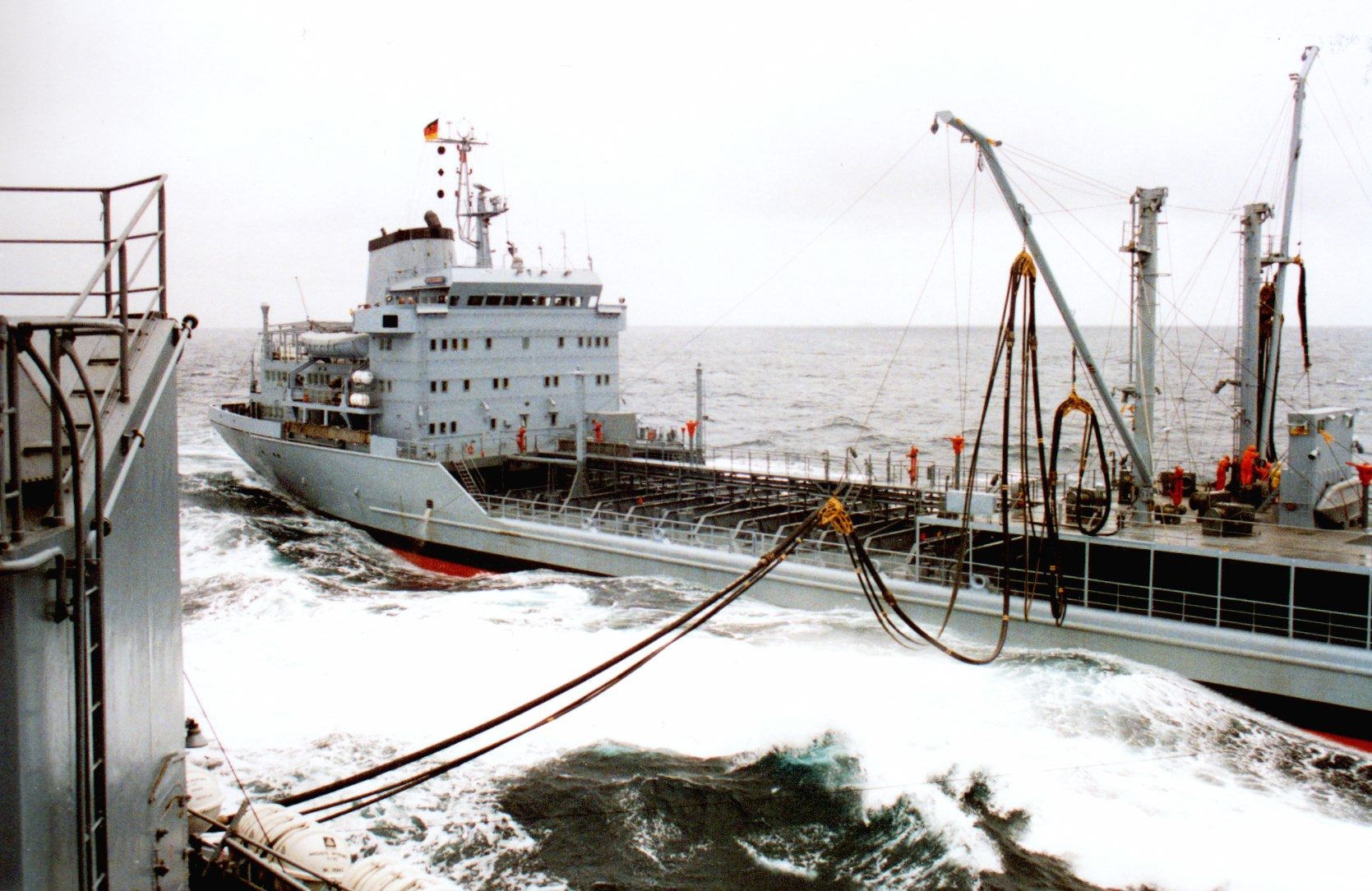 RAS-Manöver zwischen dem Versorger Spessart (A 1442) und der Fregatte Rheinland-Pfalz (F 209)